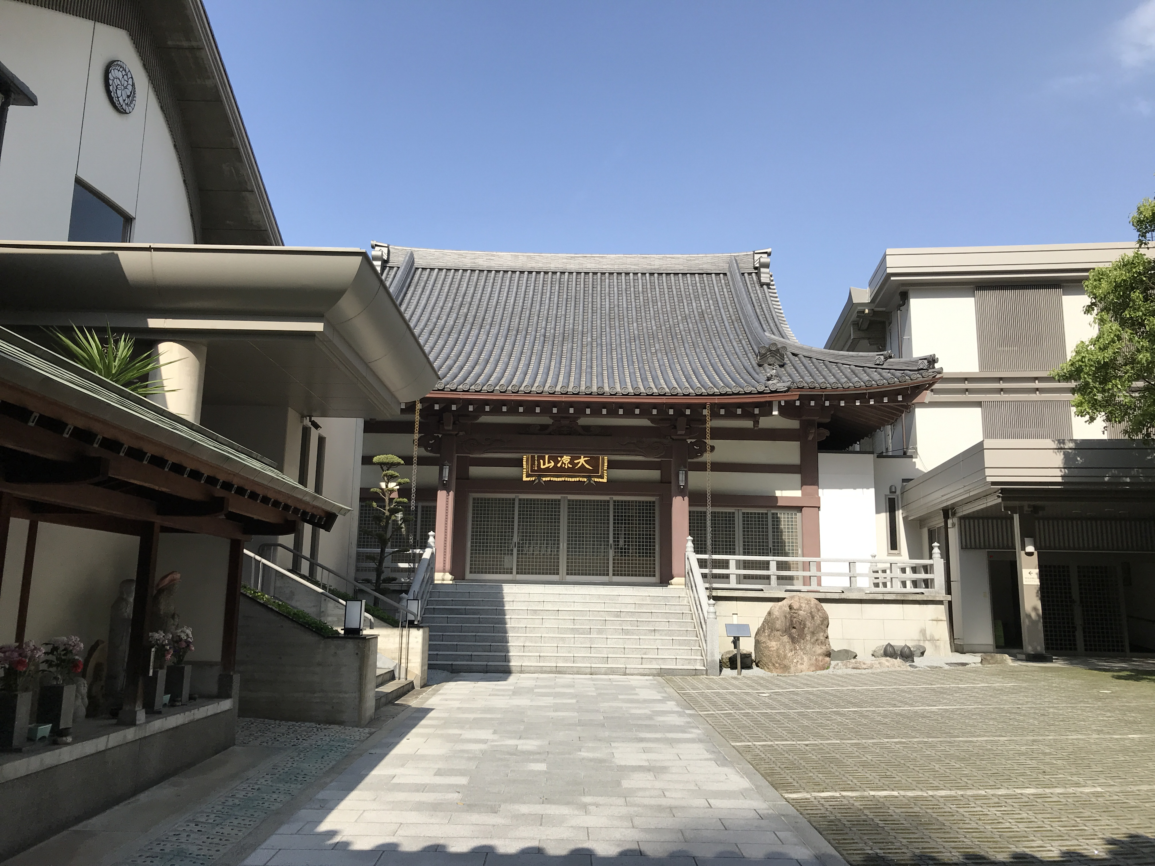 少林寺 本堂